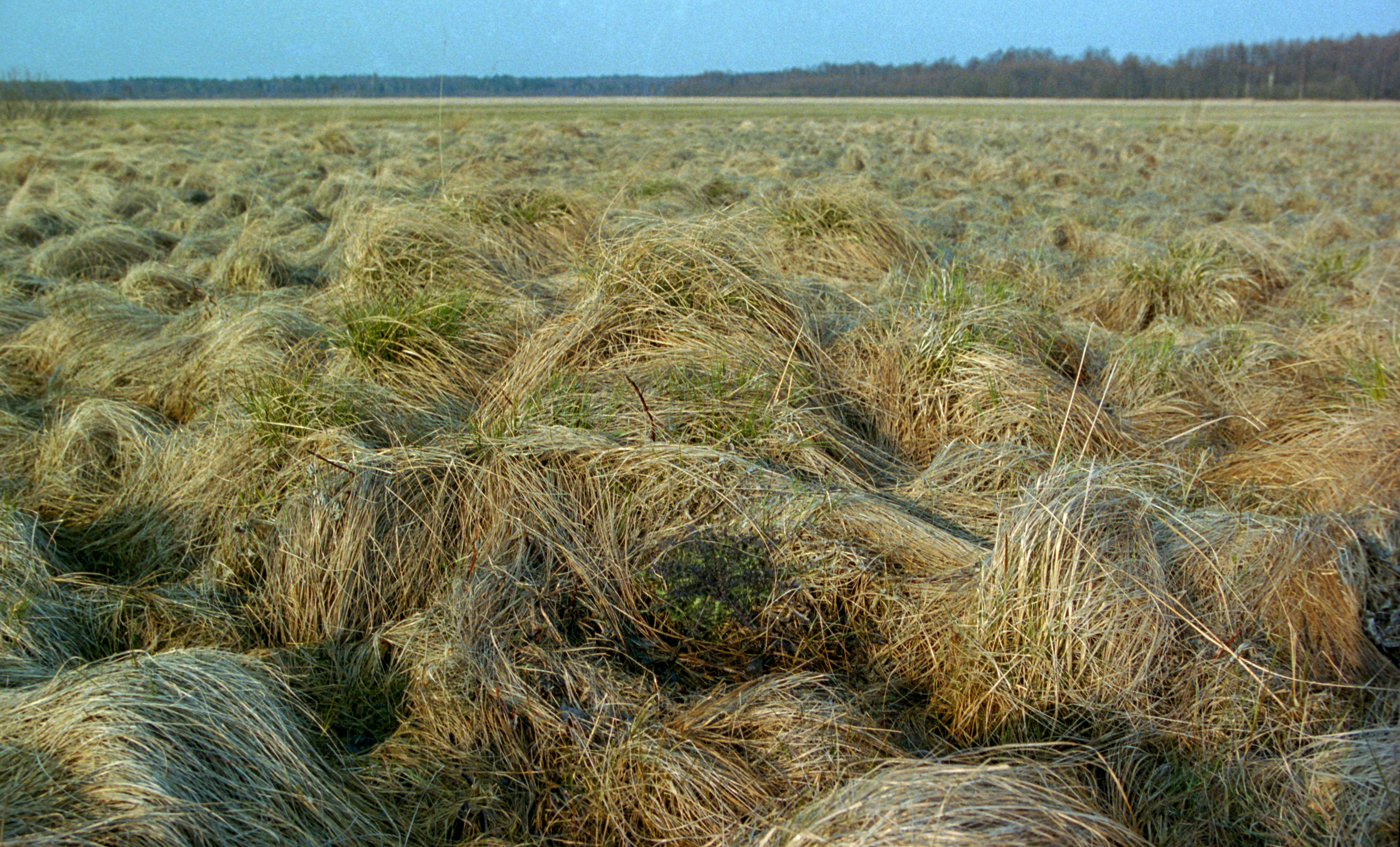 Turzycowisko, Bagno Ławki, Biebrzański Park Narodowy